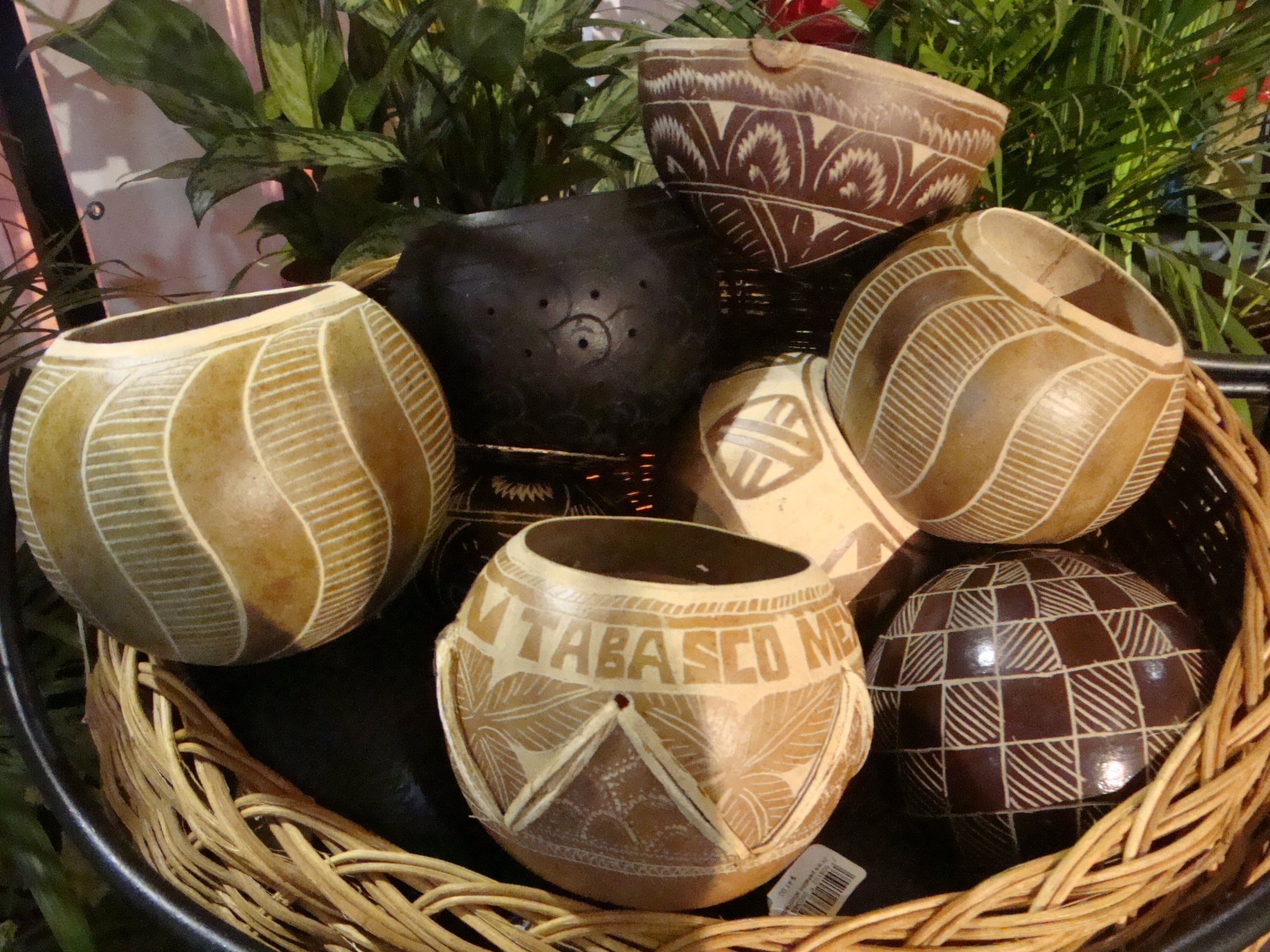 Jícaras labradas, artesanías típicas del municipio de Jalpa de Méndez, Tabasco, México